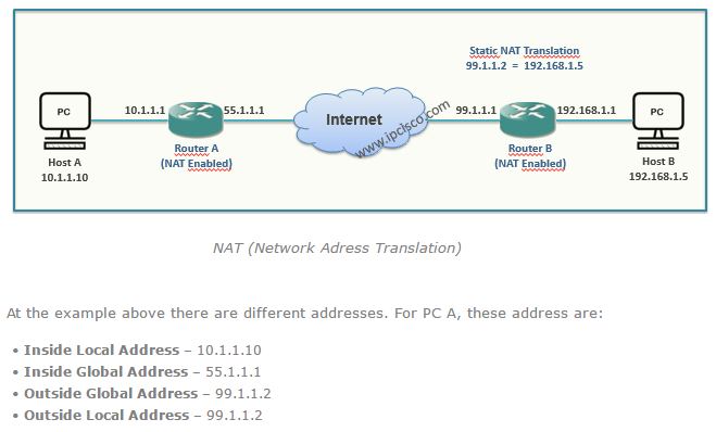 Монгол: Зураг 1. Нат Протокол